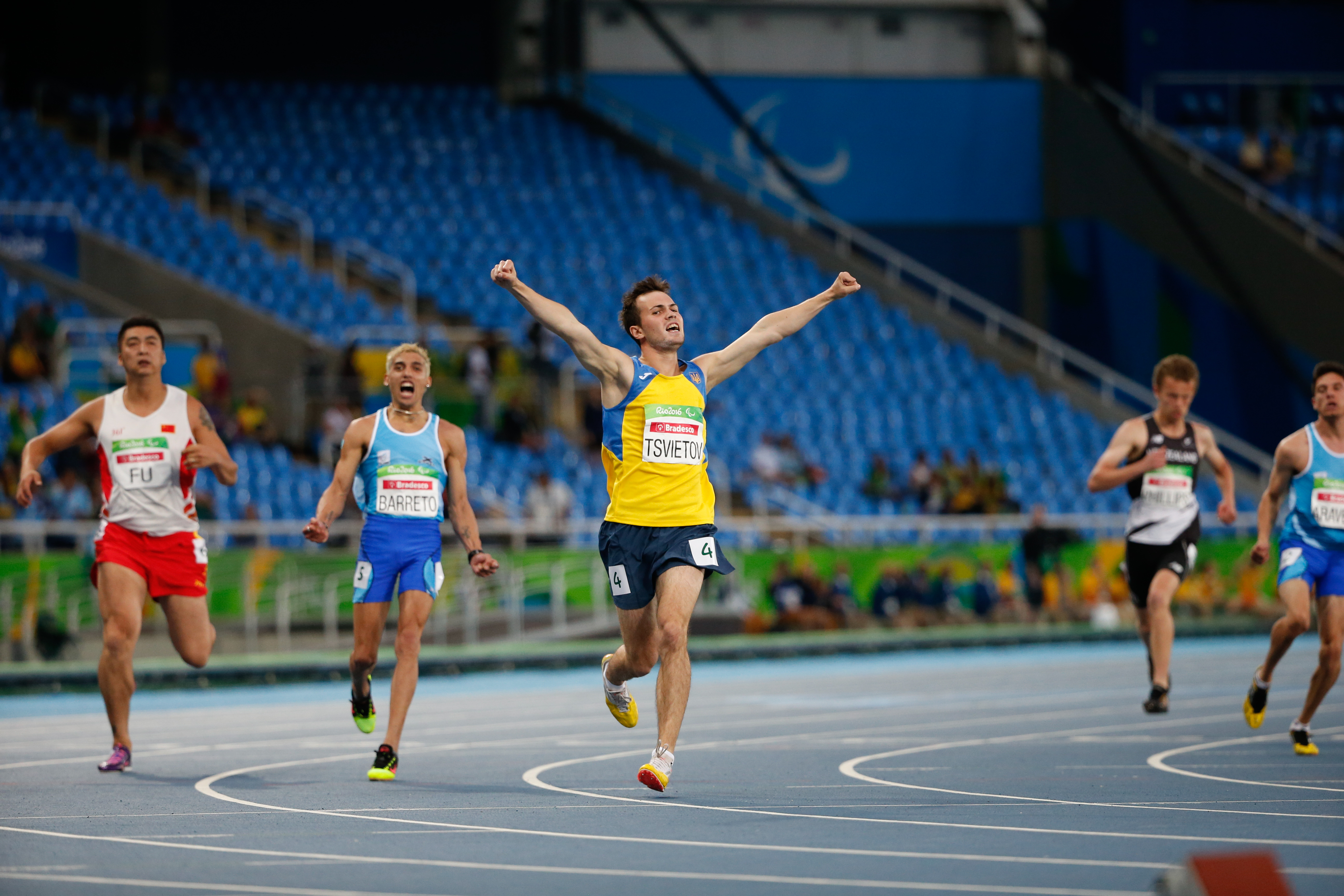 Rio de Janeiro - O ucraniano Ihor Tsvietov vence nos 100m T35 nos Jogos Paralímpicos Rio 2016, no Estádio Olímpico (Fernando Frazão/Agência Brasil)